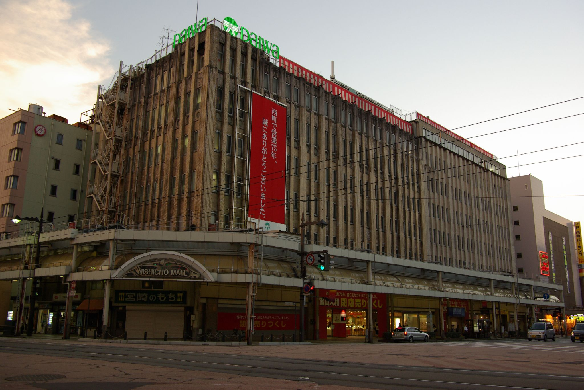 原著作者のコメント：「富山大和。富山市内唯一のデパート。大空襲で焼け残った数少ない建物。まもなく閉店(総曲輪商店街に移転)。」